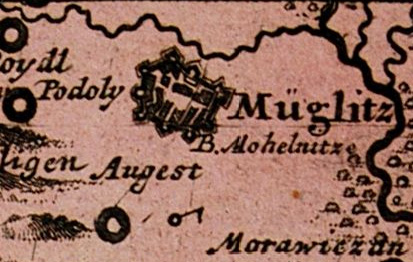 Historická mapa Mohelnice, pořízená v roce 1716 ve 2. vydání z roku 1790